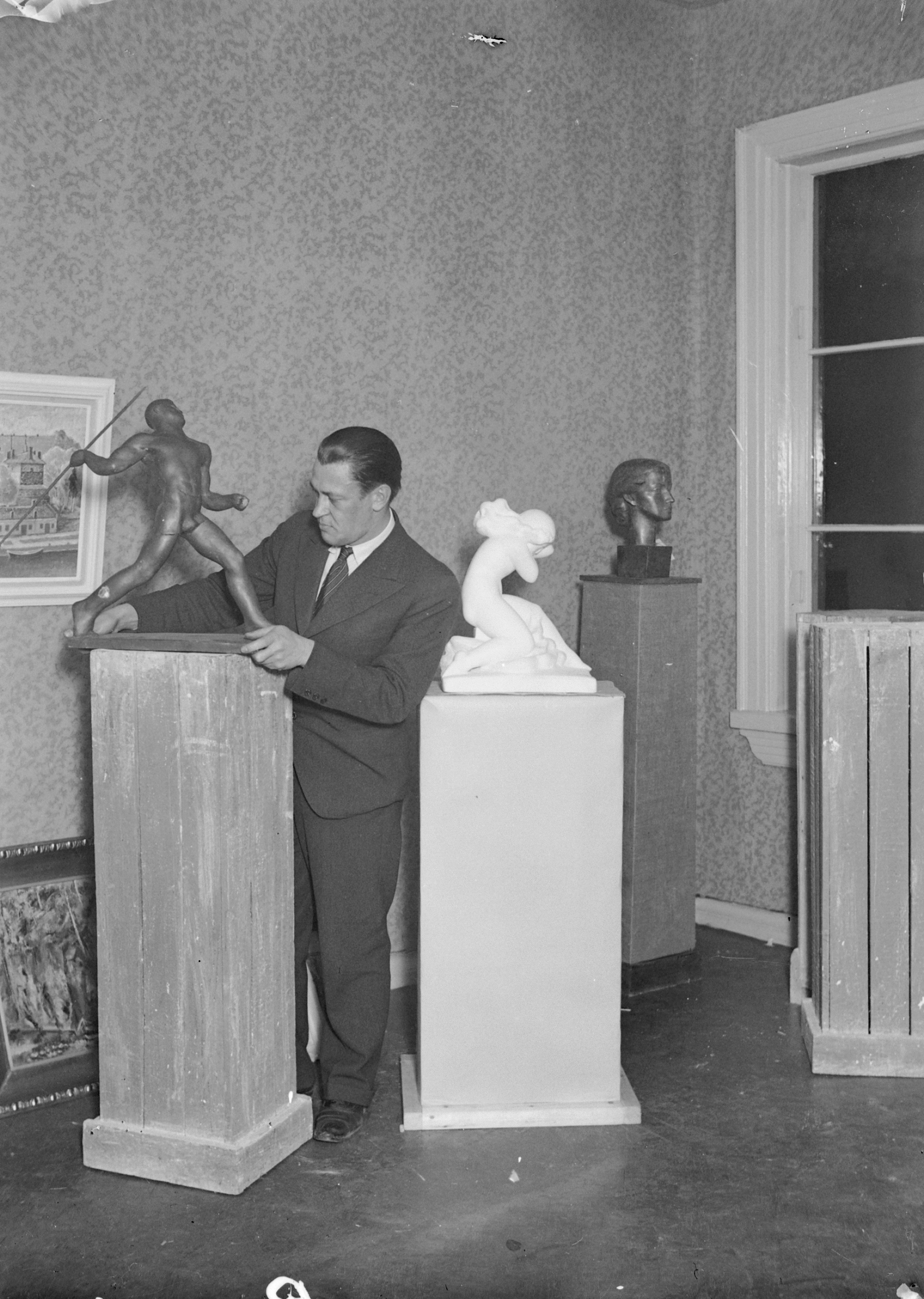 Kuvanveistäjä Sakari Tohka järjestämässä Lokakuun ryhmän ensimmäistä näyttelyä Helsingissä.